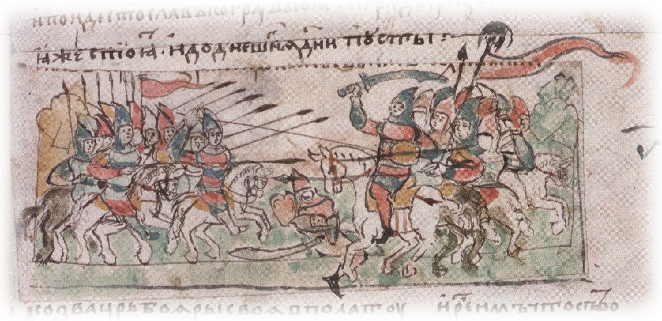 Сражение русских с греками и поражение греков